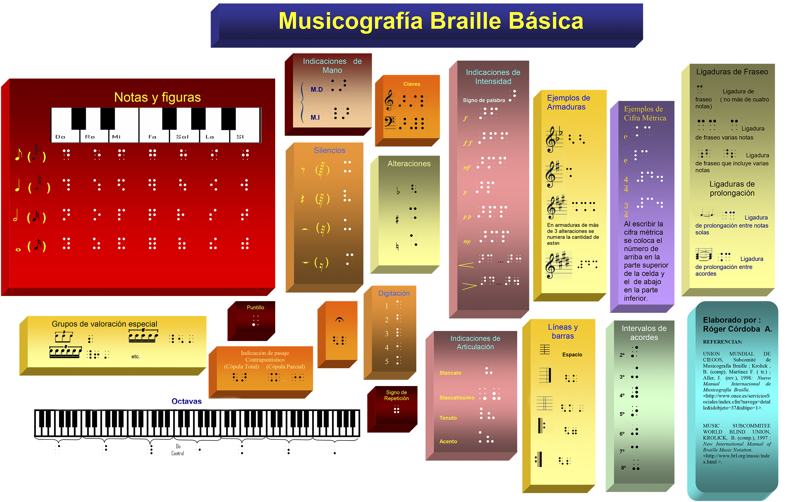 Infografía con los principales signos de Musicografía Braille